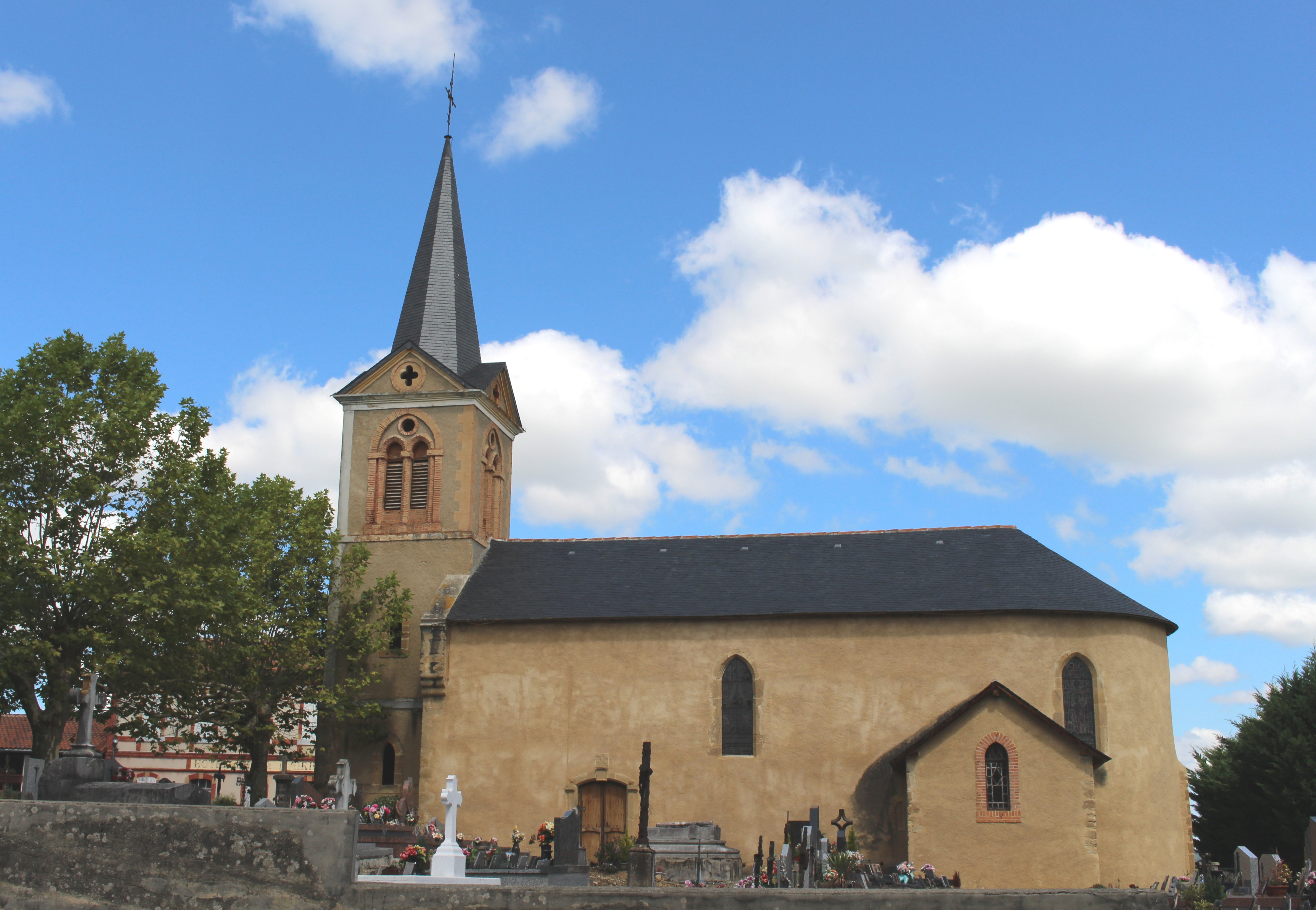 Église Saint-Pierre d'Estampures (Hautes-Pyrénées)